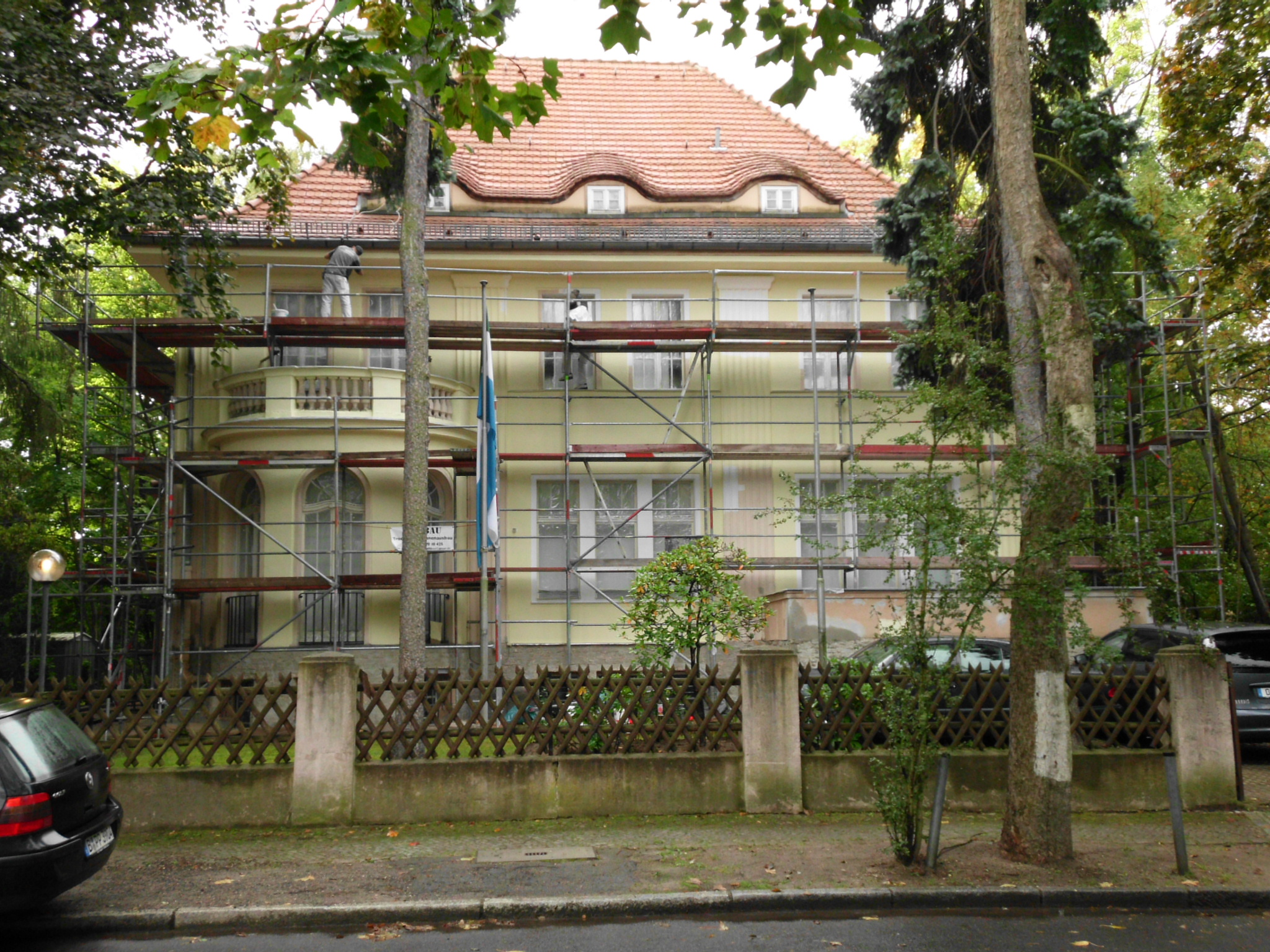 Wohnhaus, 1914–15 von Ernst Bürgel, Berlin-Lichterfelde, Herwarthstraße 4, Denkmalnr. 09065846